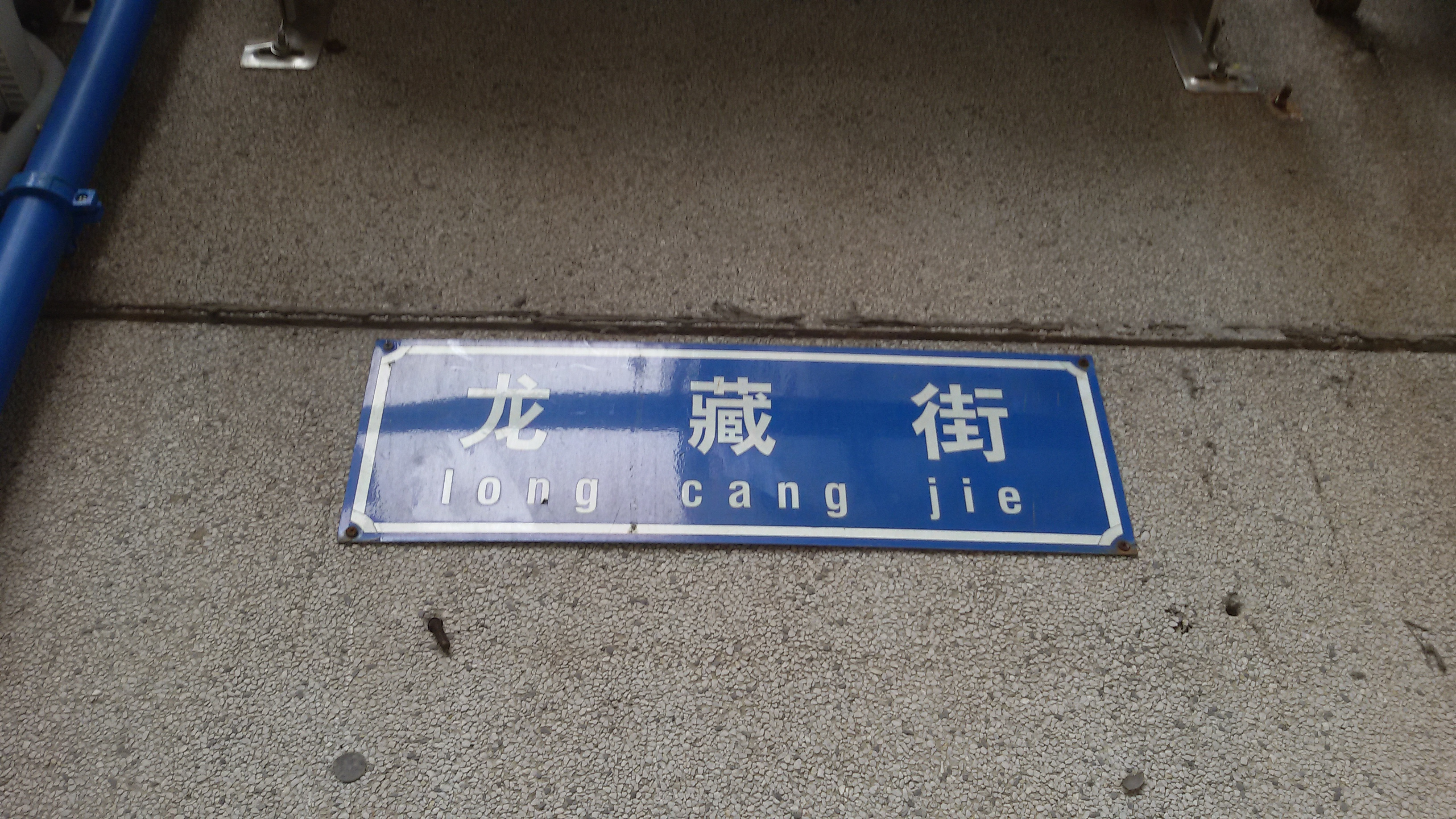 粵語: 龙藏街嘅巷牌